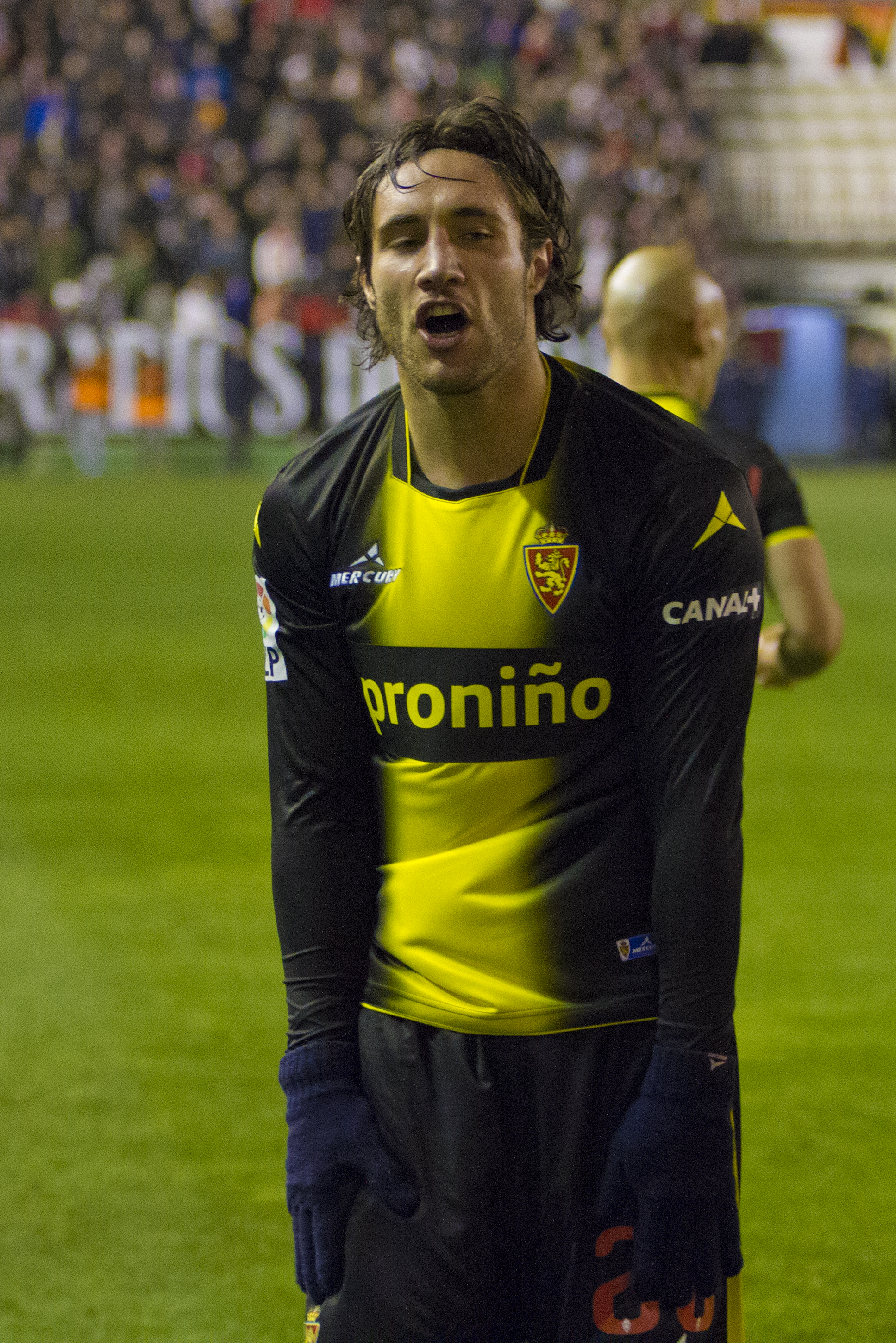 rayo vallecano vs real zaragoza